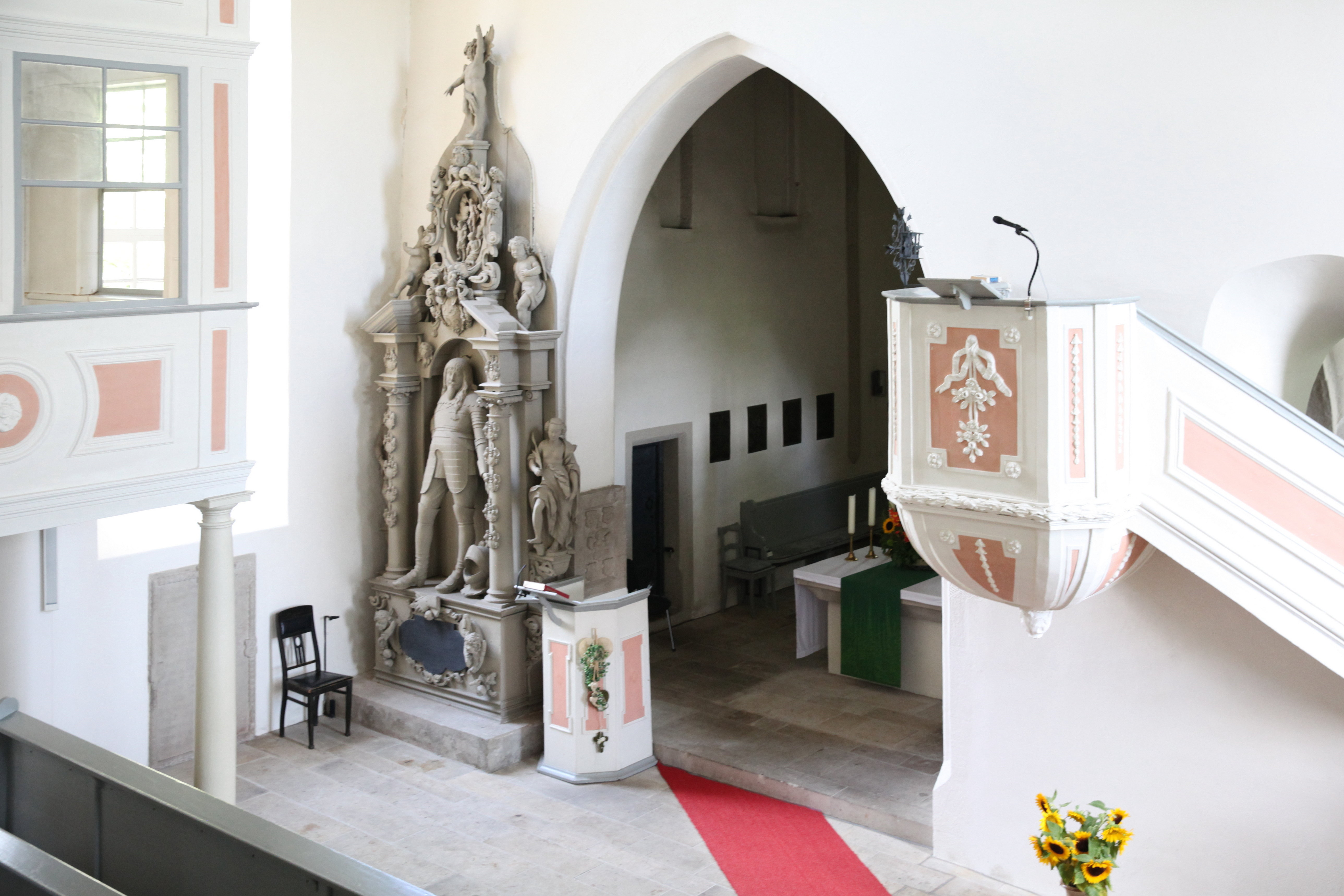 Schlosskirche in Ahorn: Holzepitaph Wilhelm Ludwig von Steitberg, Chorraum, Kanzel